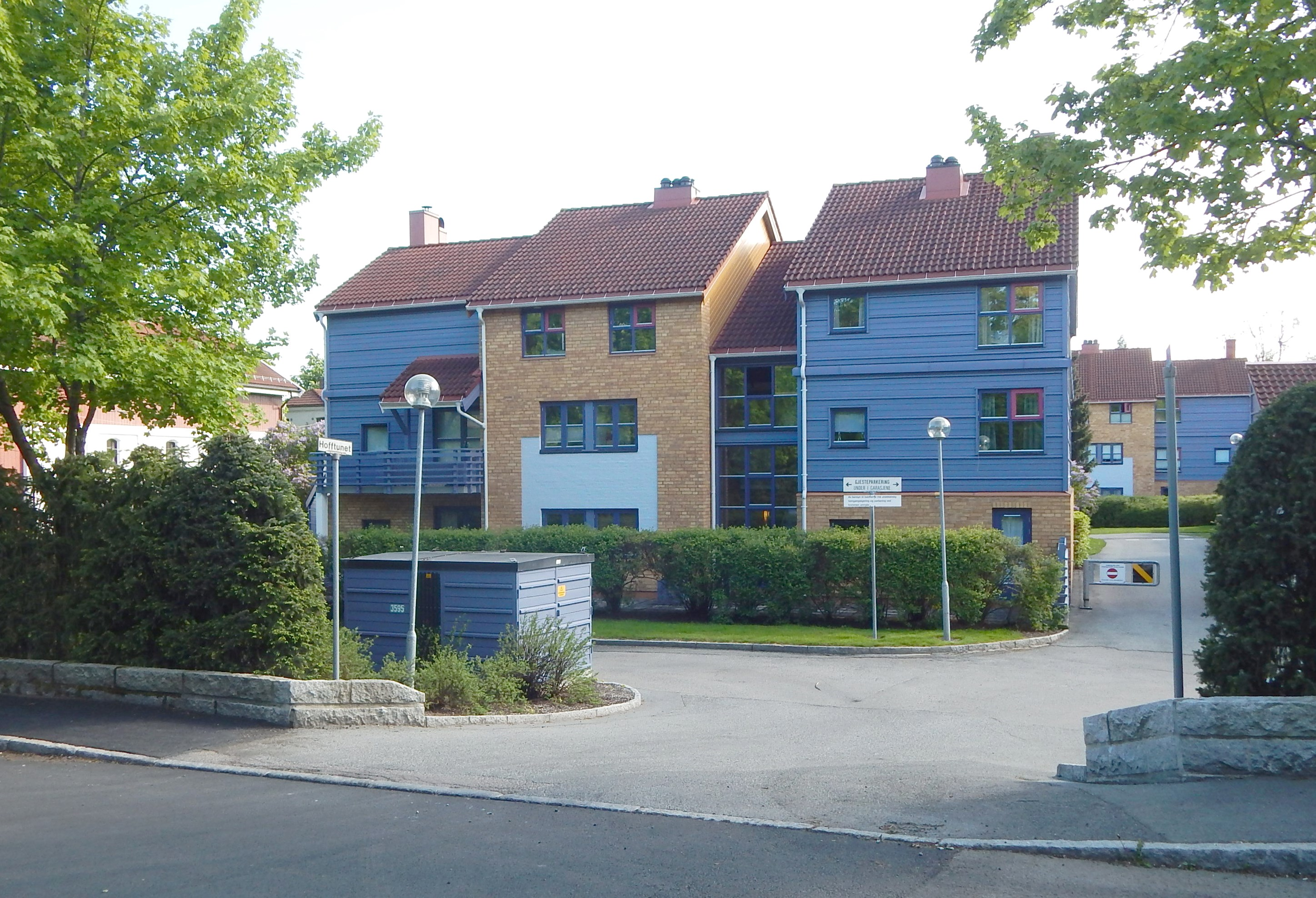 Hofftunet